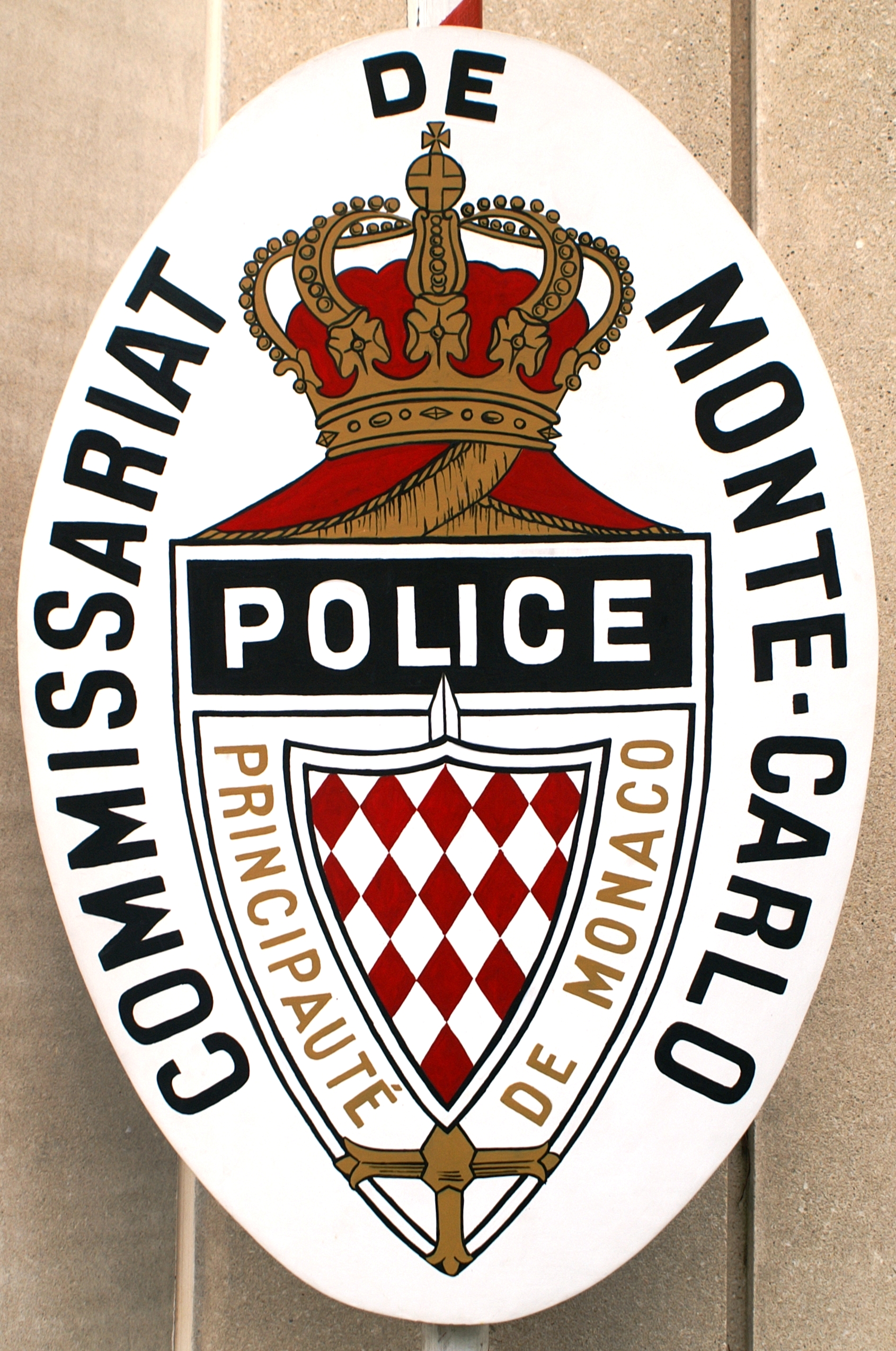 Monaco politie